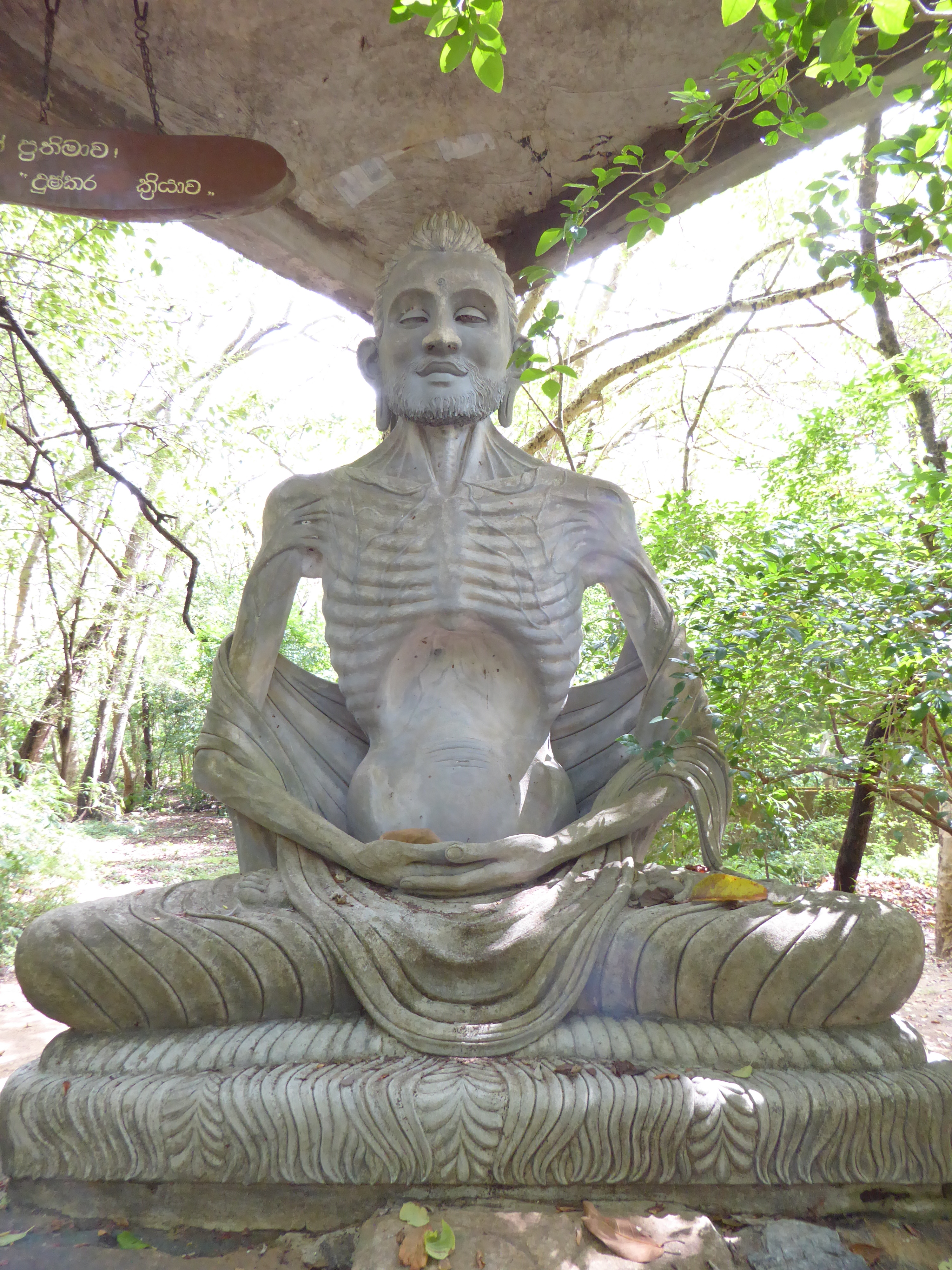 016 Bodhisatta, Sinhapura Vipassana Meditation Centre